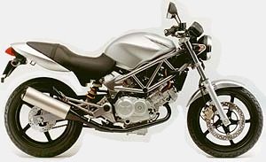 2000年モデル